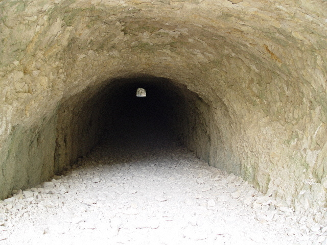 Deuxième tunnel, le Tunnel de Trescaïre. Devant l'entrée. Photographié au flash, le 15 juin 2004 à 14h20.